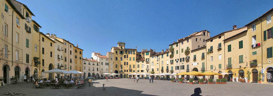 Lucca: Piazza dell'anfiteatro - panorama